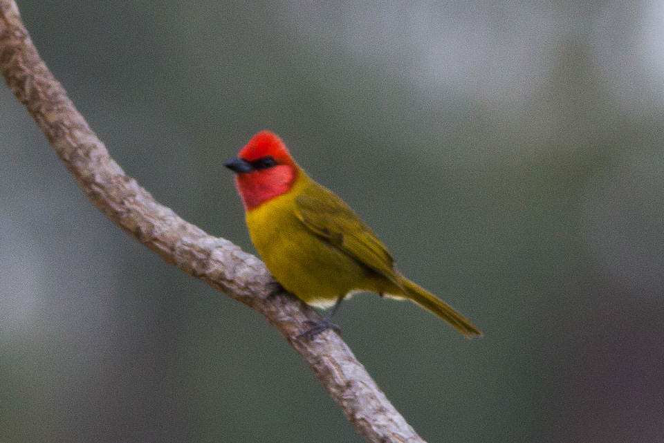 Durango Highway,Sinaloa